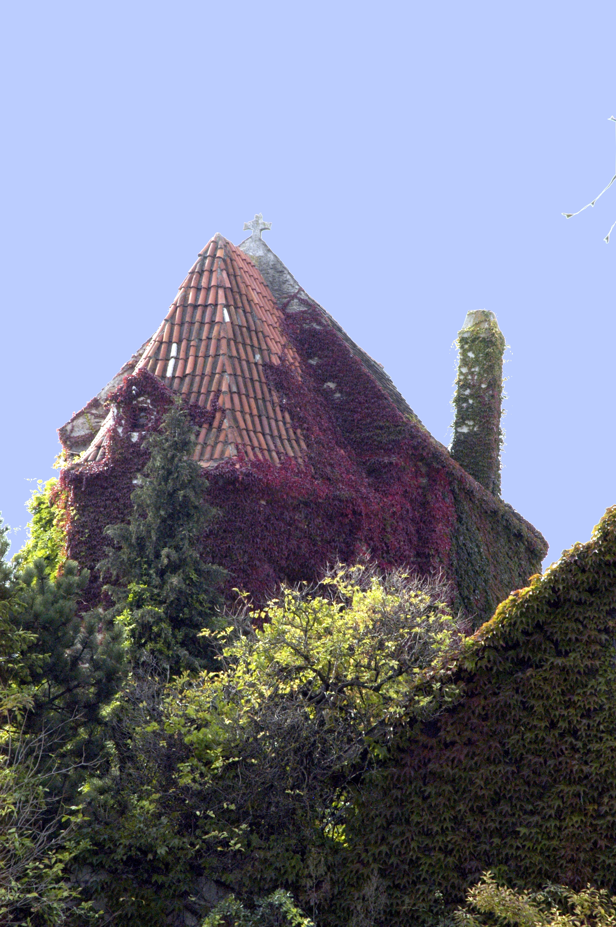 ehemalige Johanneskapelle des Zwettlerhofes in Rafing, Gemeinde Pulkau